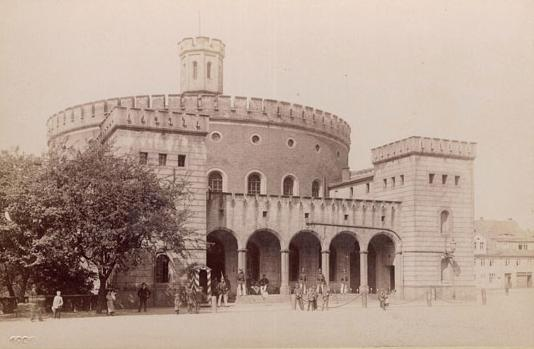 Kaisertrutz in Görlitz 1893